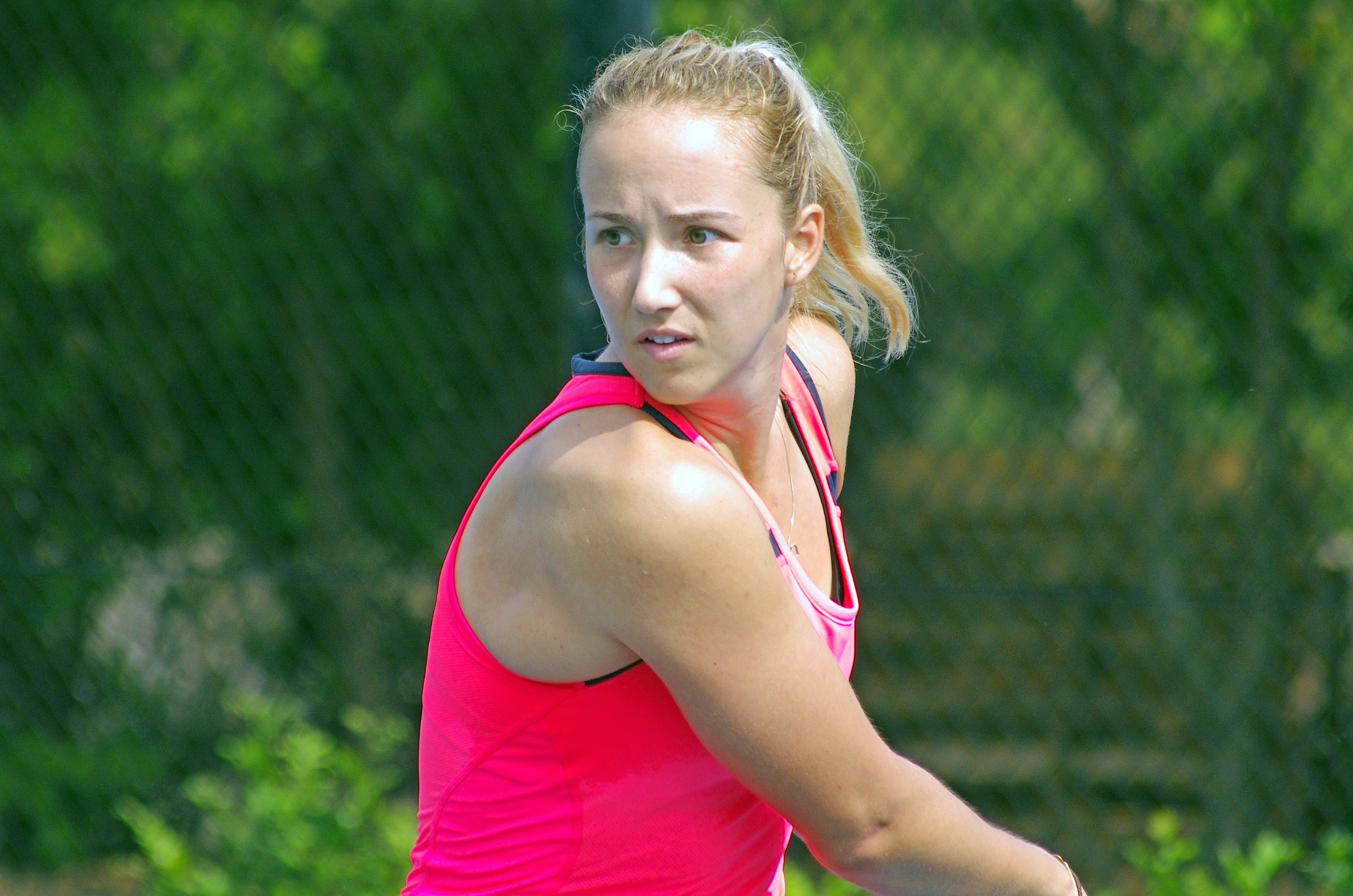 PAULA KANIA